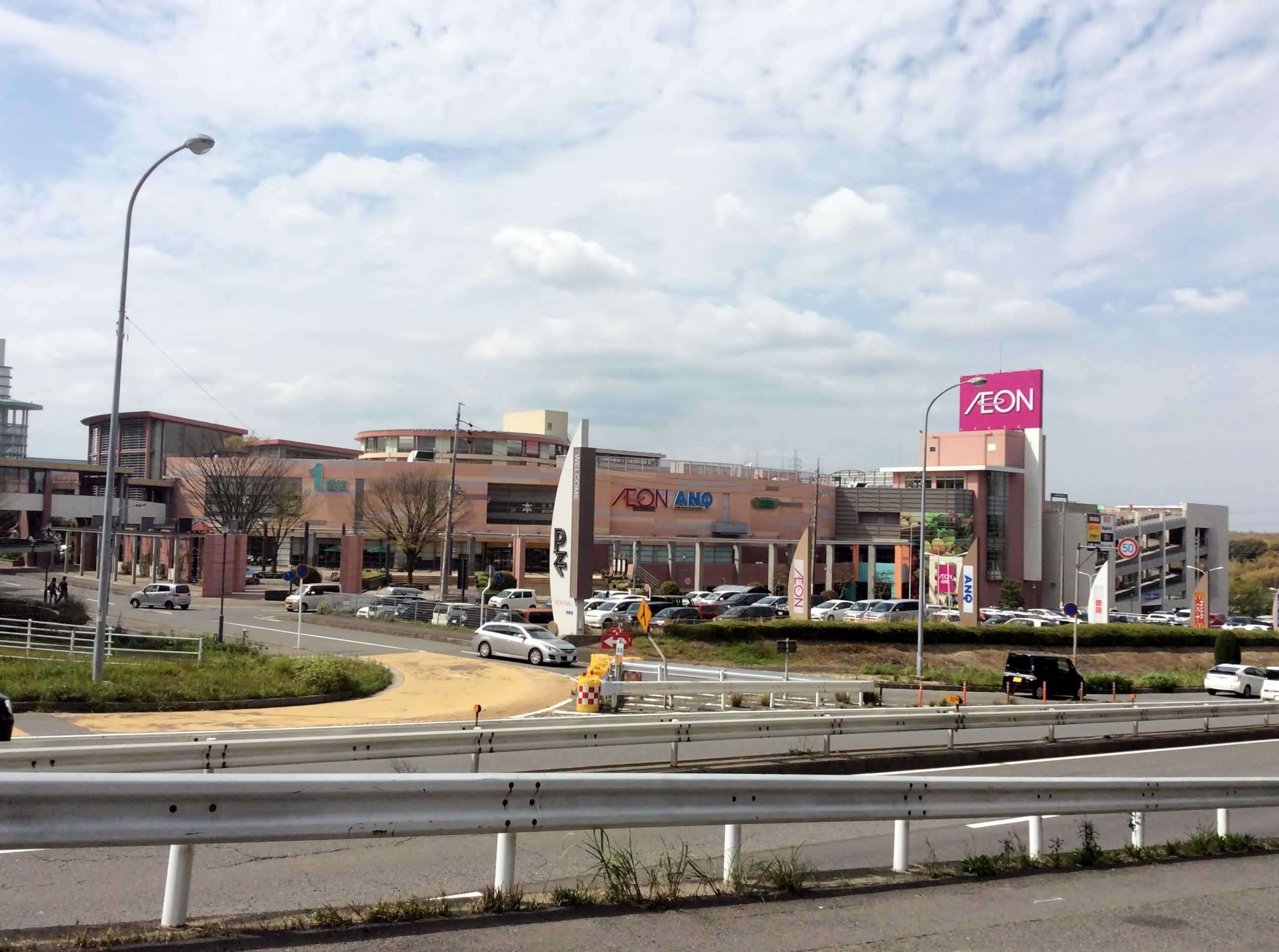 イオンモール桑名1番街を撮影。